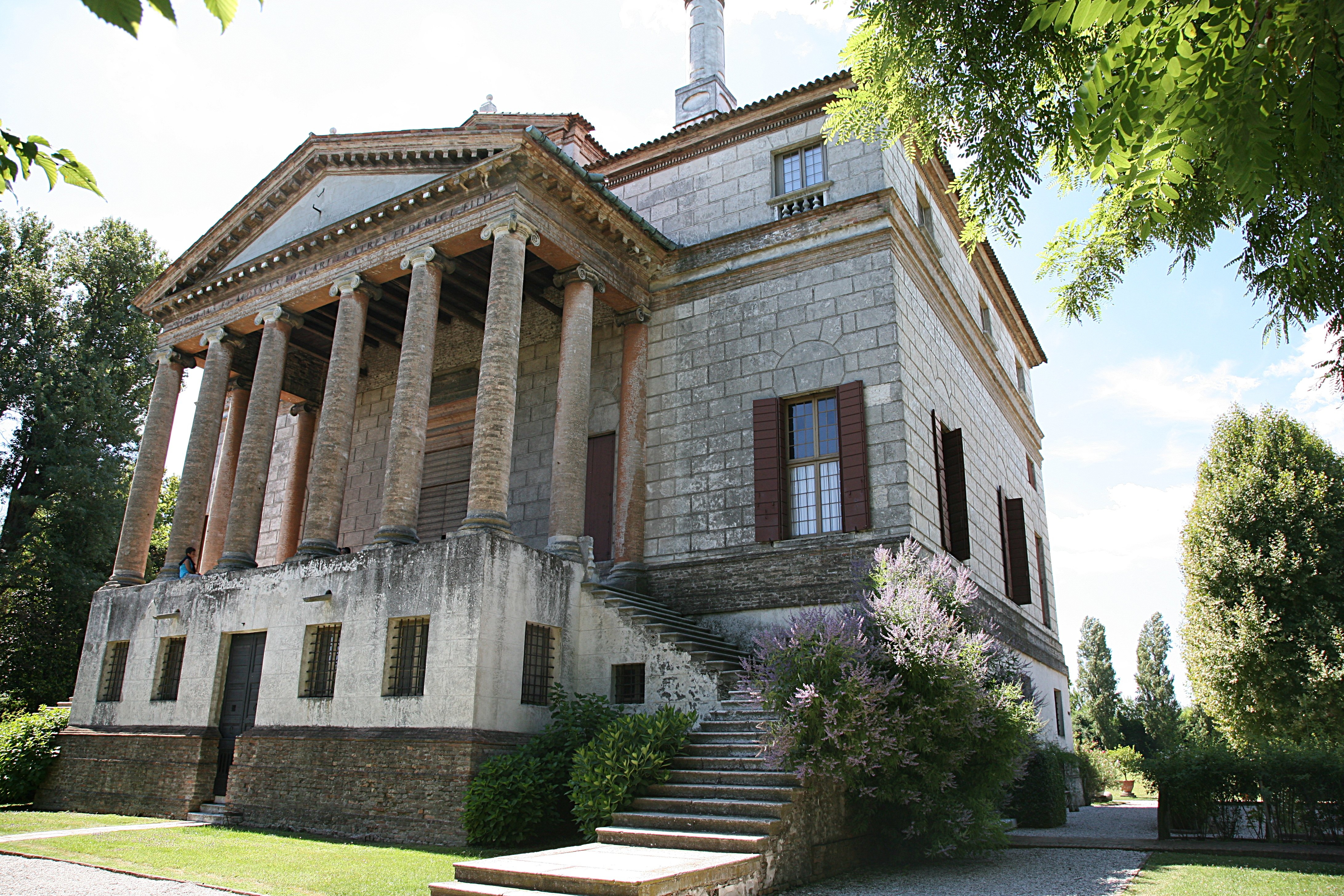 Villa near Venezia